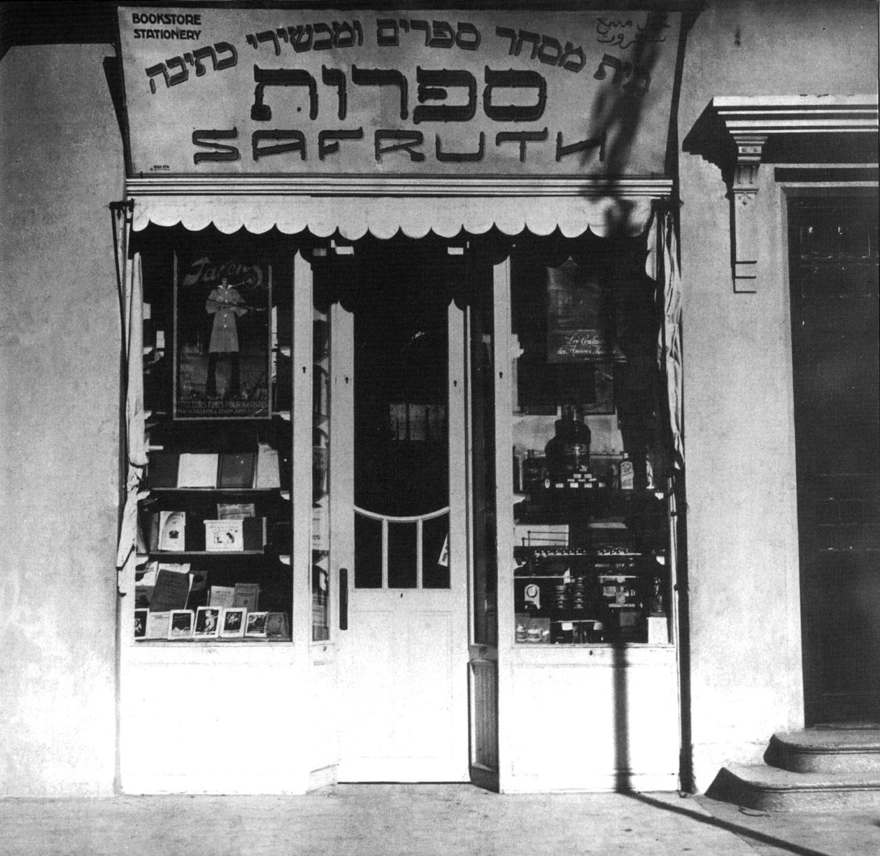 "ספרות", בית מסחר לספרים ומכשירי כתיבה, דרך יפו, תל-אביב